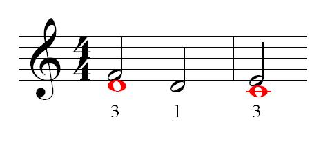 Noodinäide range kontrapunkti reegli kohta, mille alusel on teatud tingimustel lubatud unisoon ka loo keskel. Kasutatud on programme Finale 2005 ja MS Paint. Antud noodinäide on lihtsustatud variant noodinäitest Knud Jeppeseni raamatust "Kontrapunkt" (Leipzig, 1956) lk 91.